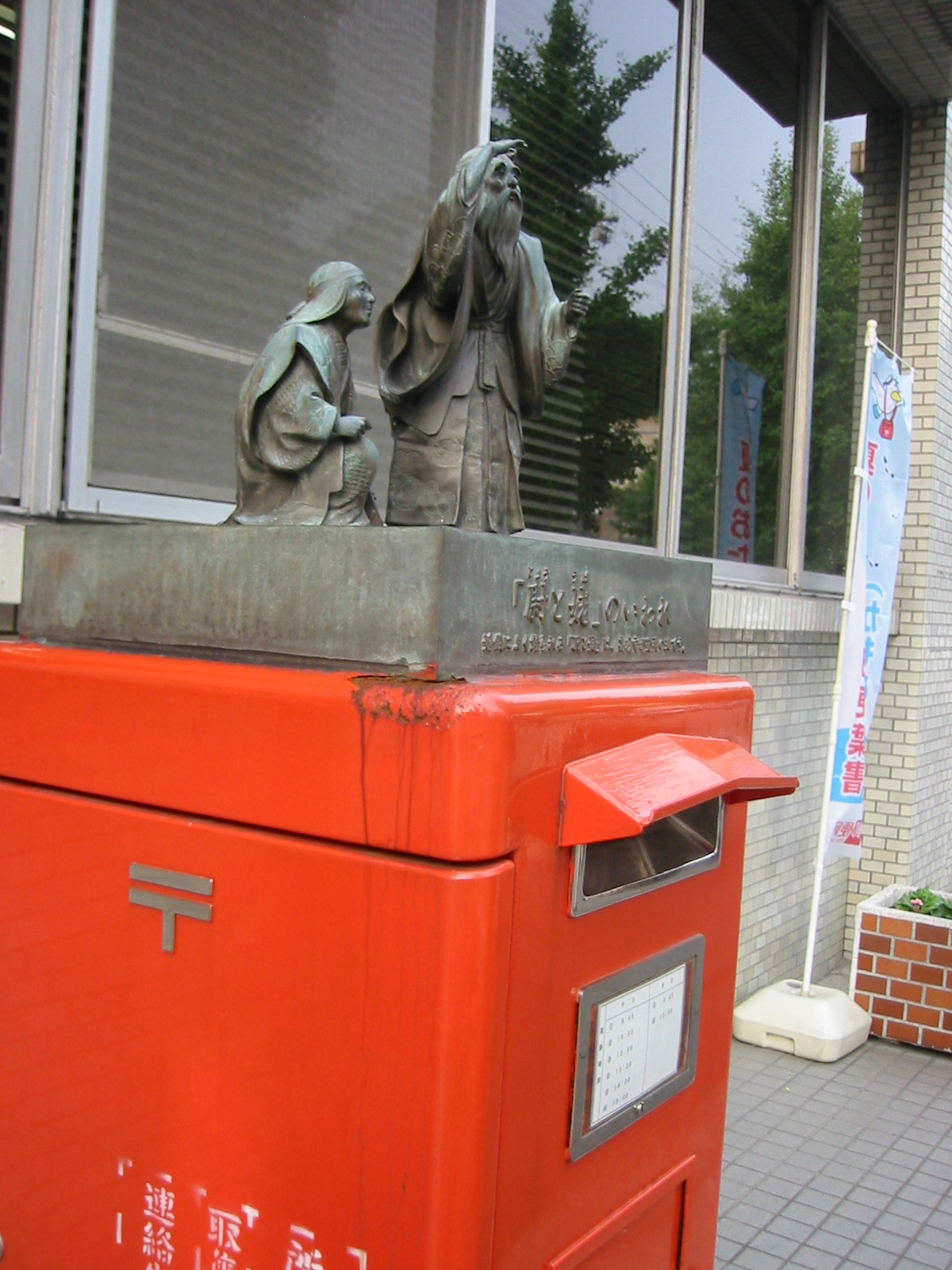 能 高砂の尉と姥の老夫婦(イザナギとイザナミ)